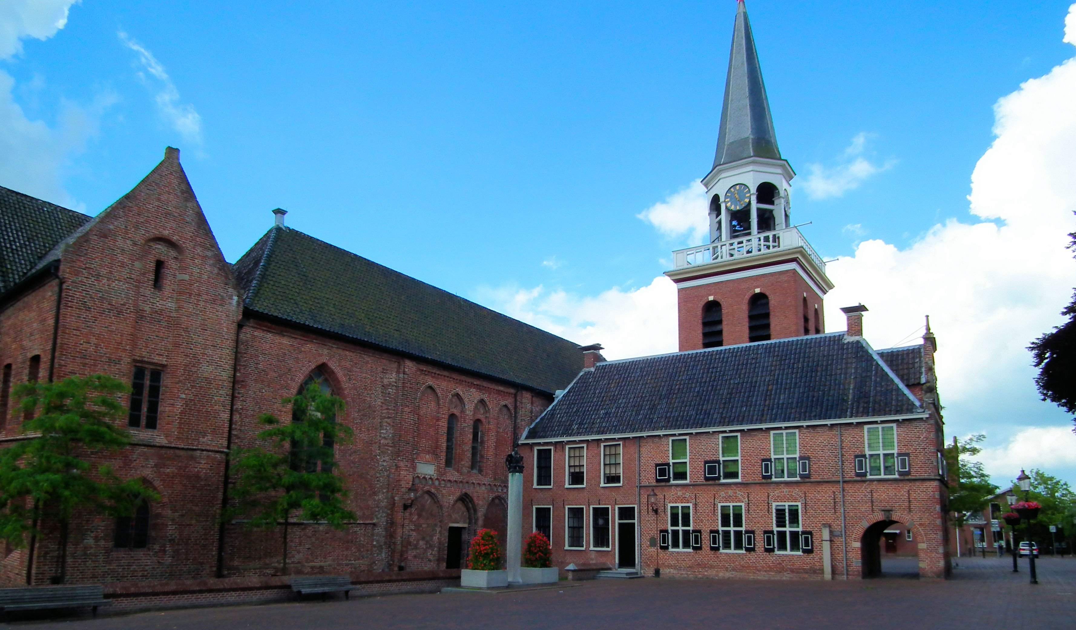 Het historische centrum van Appingedam (NL) - Stadhuis en Nicolaikerk